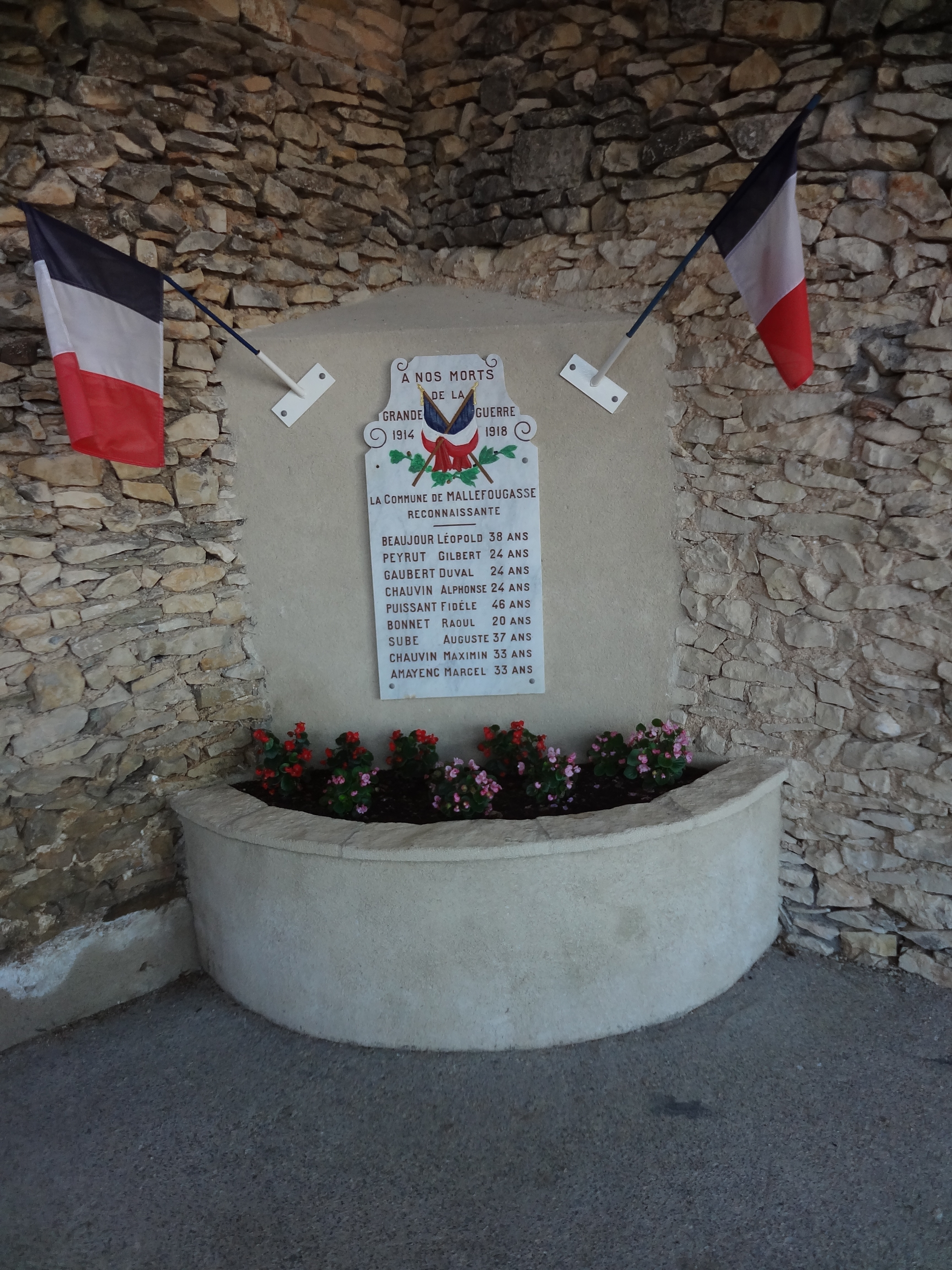 Monument aux morts de Mallefougase-Augès